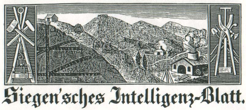 Titel